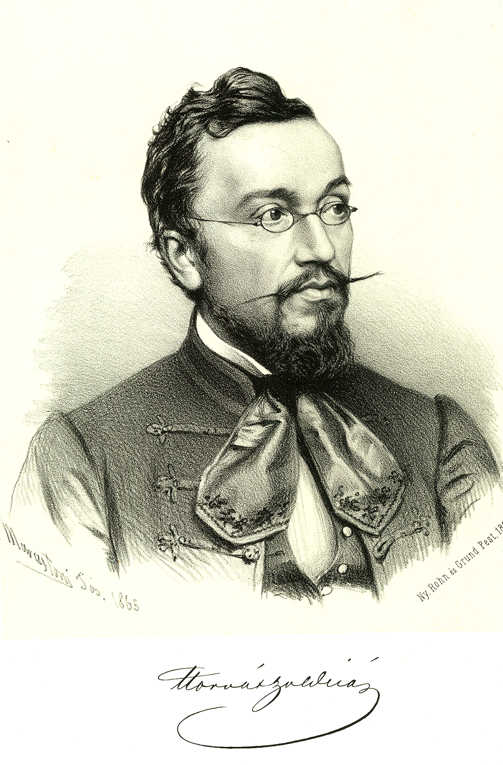 Horvát Boldizsár (olykor Horváth, Szombathely, 1822. január 1. – Budapest, 1898. október 28.) magyar író, költő, jogtudós, politikus, igazságügy-miniszter az Andrássy-kormányban. Az MTA és a Kisfaludy Társaság tagja.